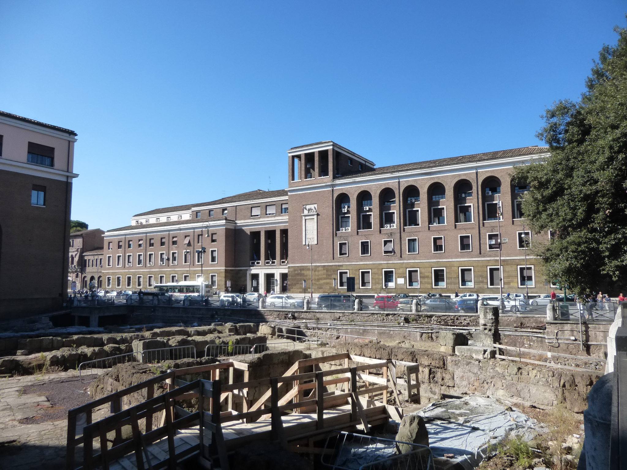 Roma, area sacra di S. Omobono, via Petroselli e palazzo dell'Anagrafe (già del Governatorato) (Ignazio Guidi, 1937)